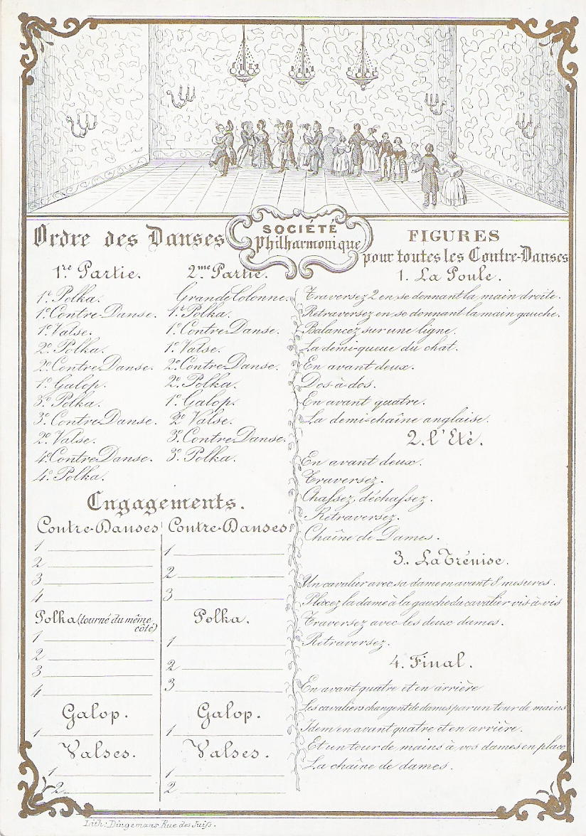 Collection privée